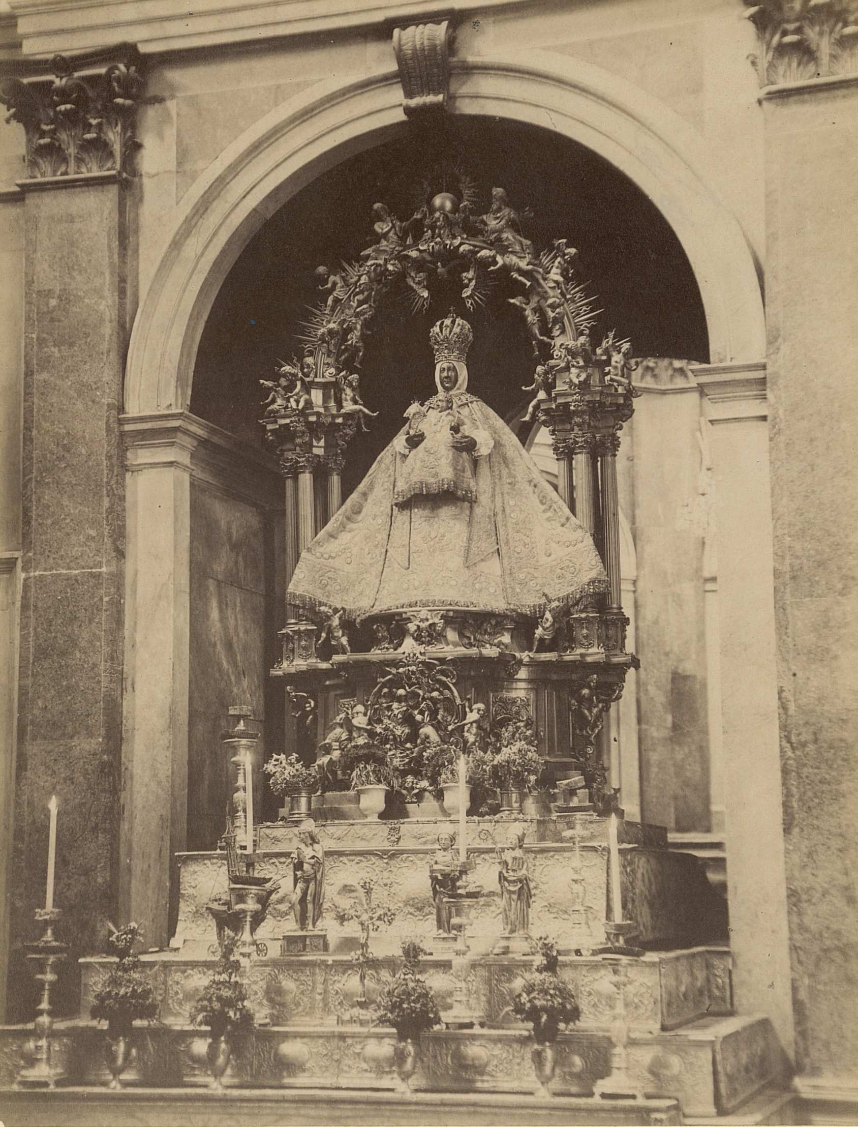 Catedral de Toledo, capilla de la Virgen del Sagrario, de Casiano Alguacil.